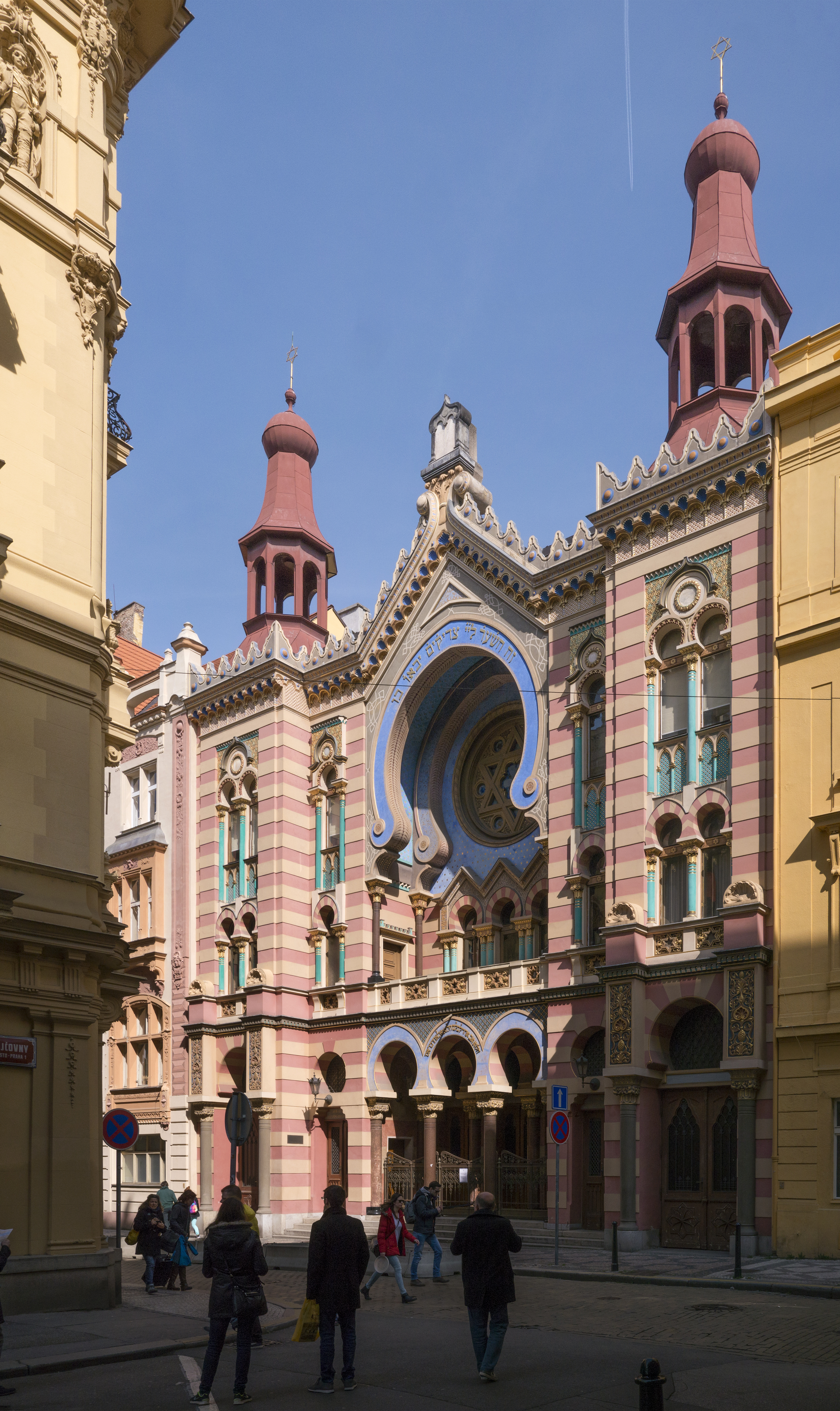 Prag Jerusalemsynagoge